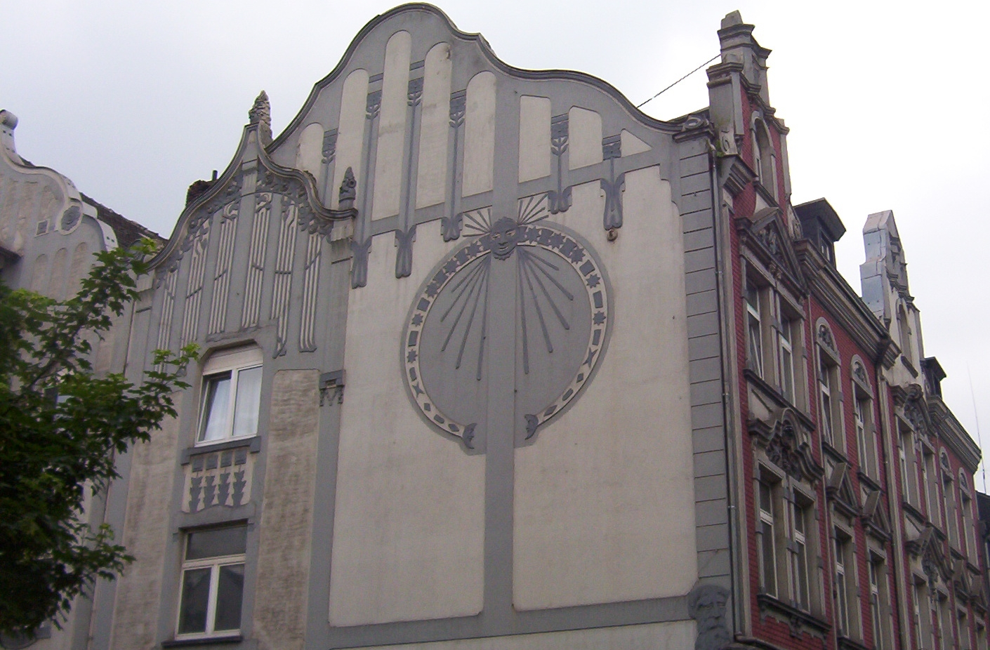 Gründerzeitfassade am Wilhelmplatz